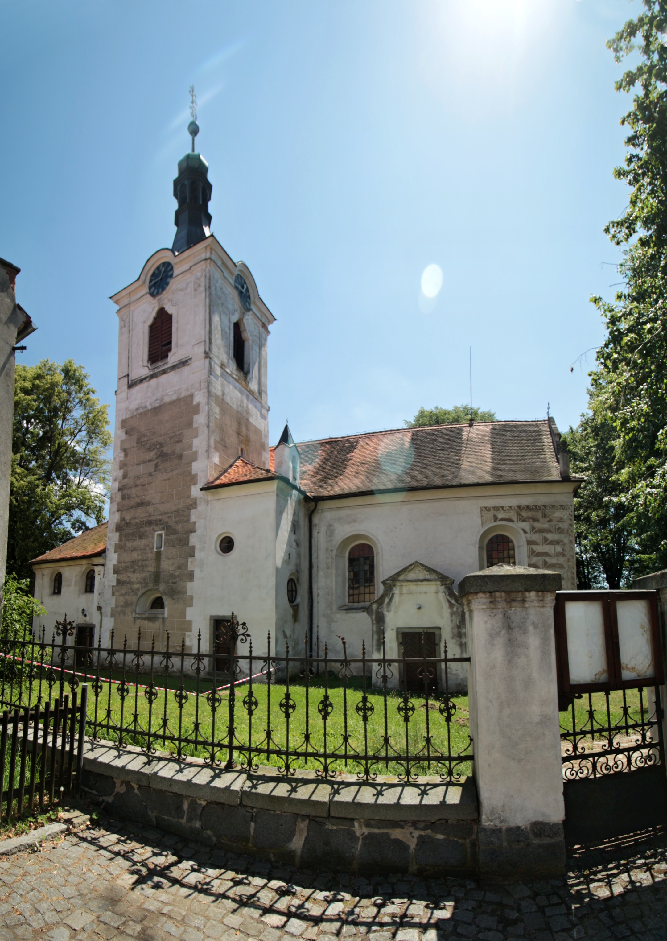 Kosova Hora, kostel sv. Bartoloměje a fara